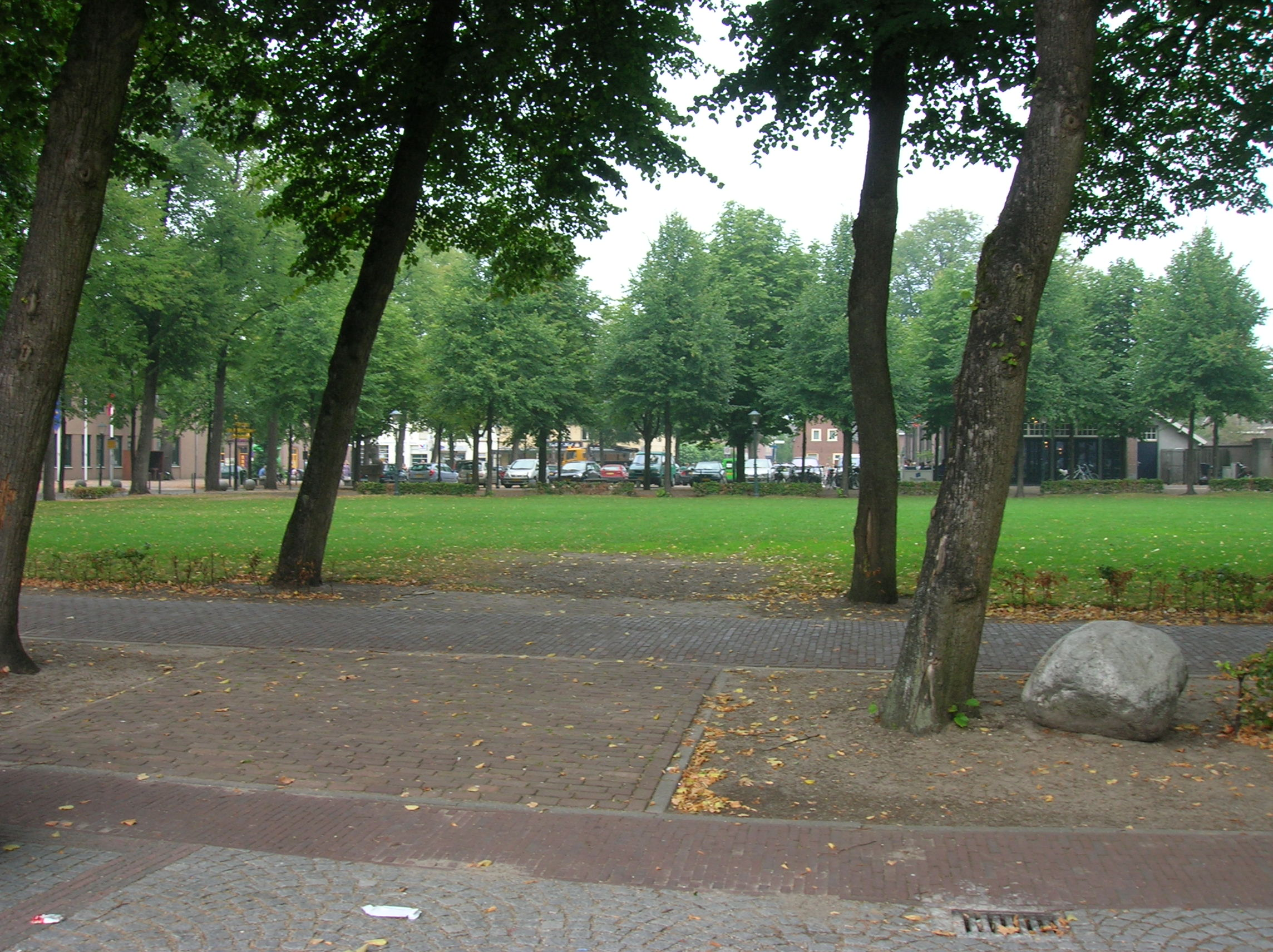 Zelfgemaakte foto, 17 september 2006, Erik1980: De Brink in Sint Anthonis